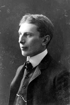 Герман Гезеллиус, финский архитектор